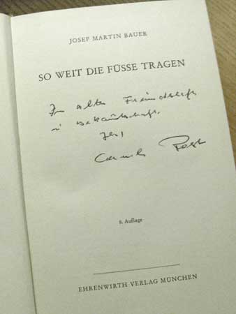 Exemplar von So weit die Füße tragen mit persönlicher Widmung von Cornelius Rost: „In alter Freundschaft und Bekanntschaft, Ihr Cornelius Rost“